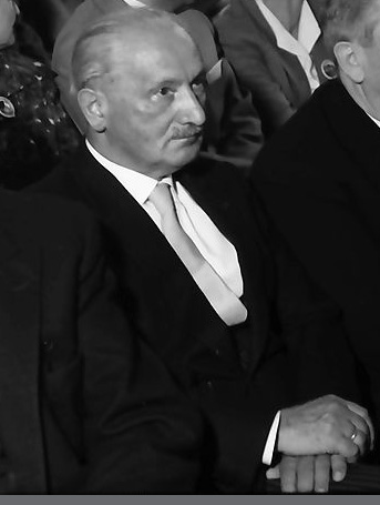 Photograph of Martin Heidegger. Detail of a phototograph entitled : "W 134 Nr. 060678d - Hausen: Festakt, in der Reihe, Kultusminister Storz, Prof. Heidegger, Dichtel". Additional reference : Teilbestand W 134 (Neg. BaWü), Teil 1 - Fotosammlung Willy Pragher: Filmnegative Baden-Württemberg, Teil 1.